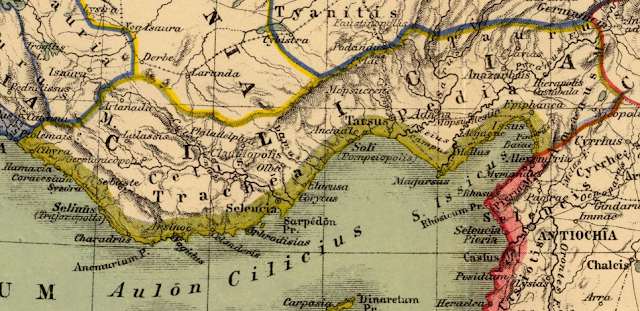 Roma-Bizans dönemi Kilikya